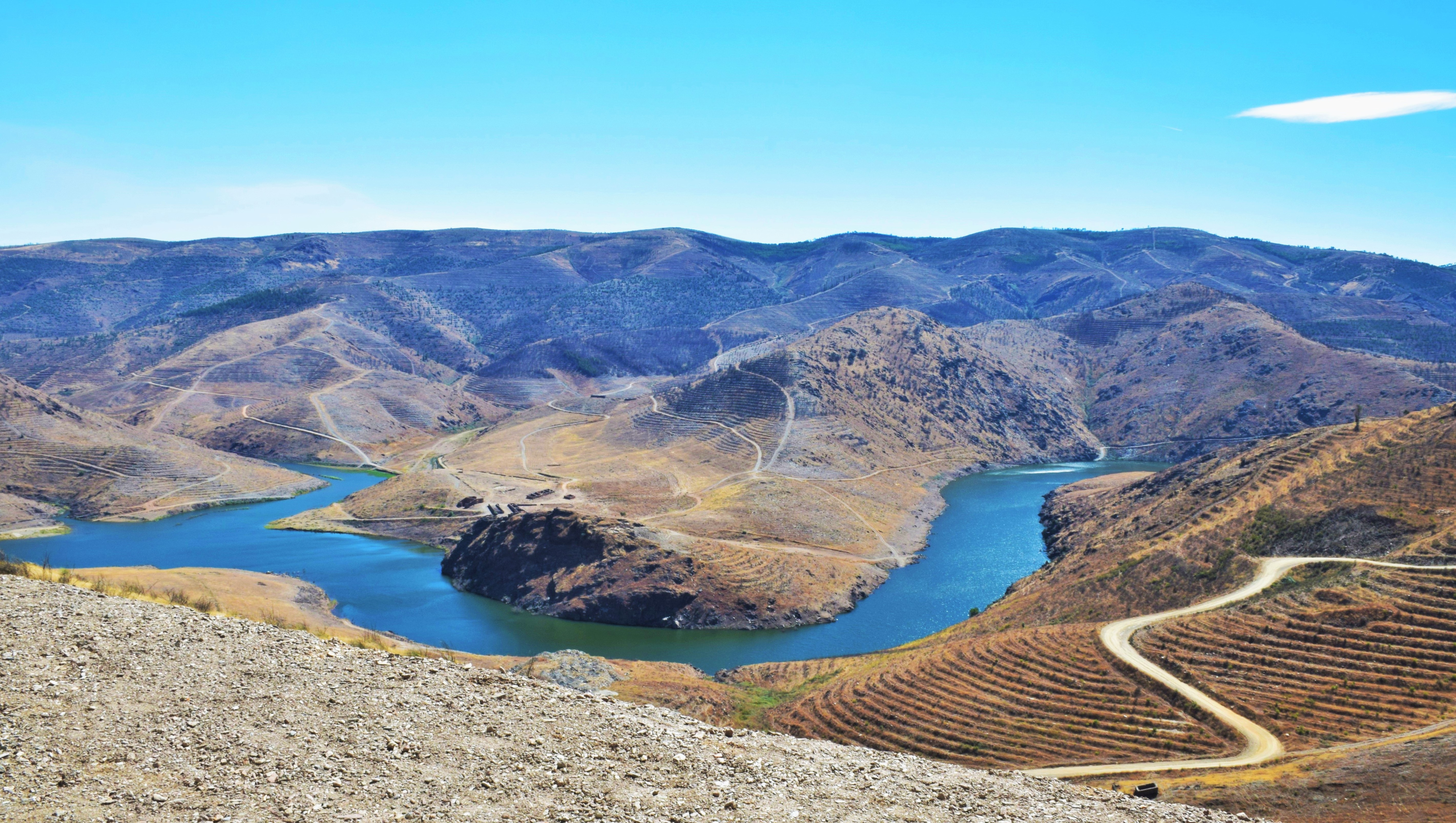 Rio Sabor - vista retirada desde o Santuário de Santo Antão This is a photography of a Site of Community Importance in Portugal with the ID: PTCON0021. Natura2000 entry, EEA entry